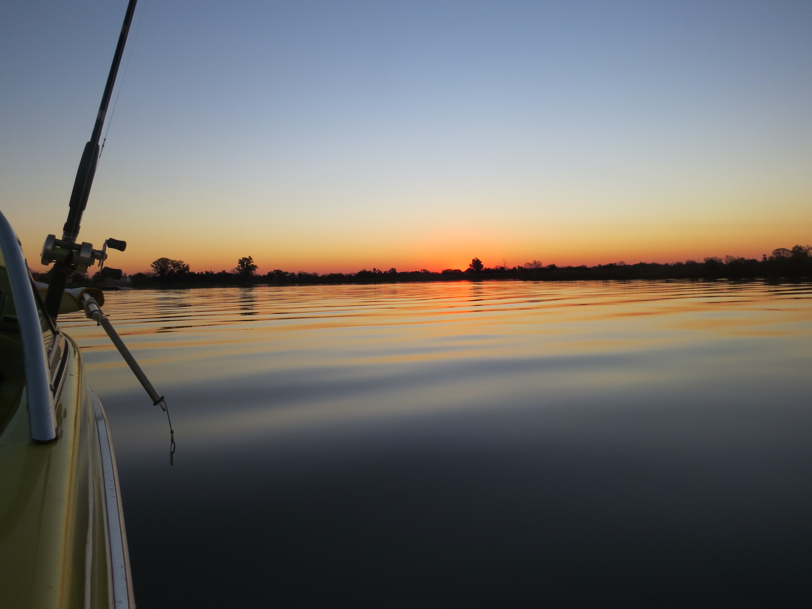 Ecotursimo y Naturaleza